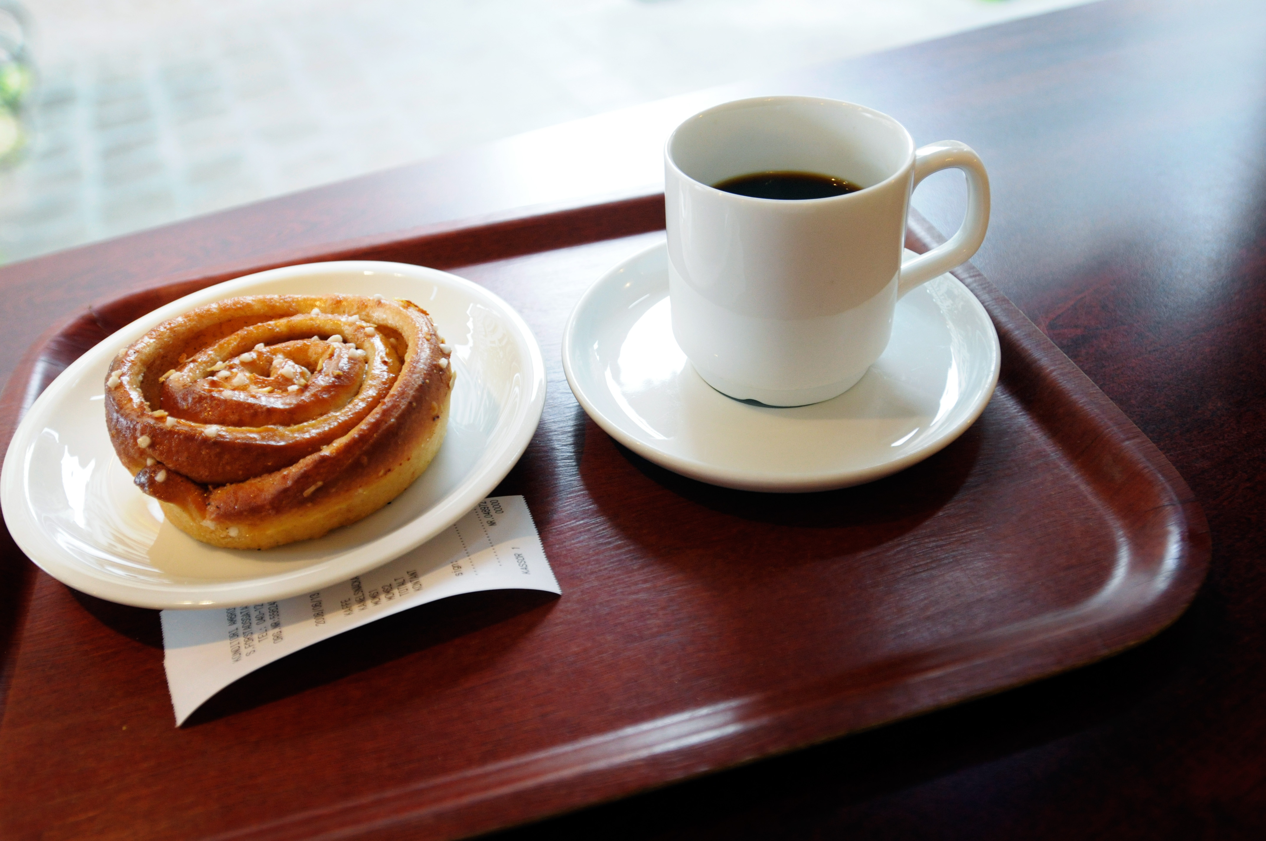 Fika kaffe bulle